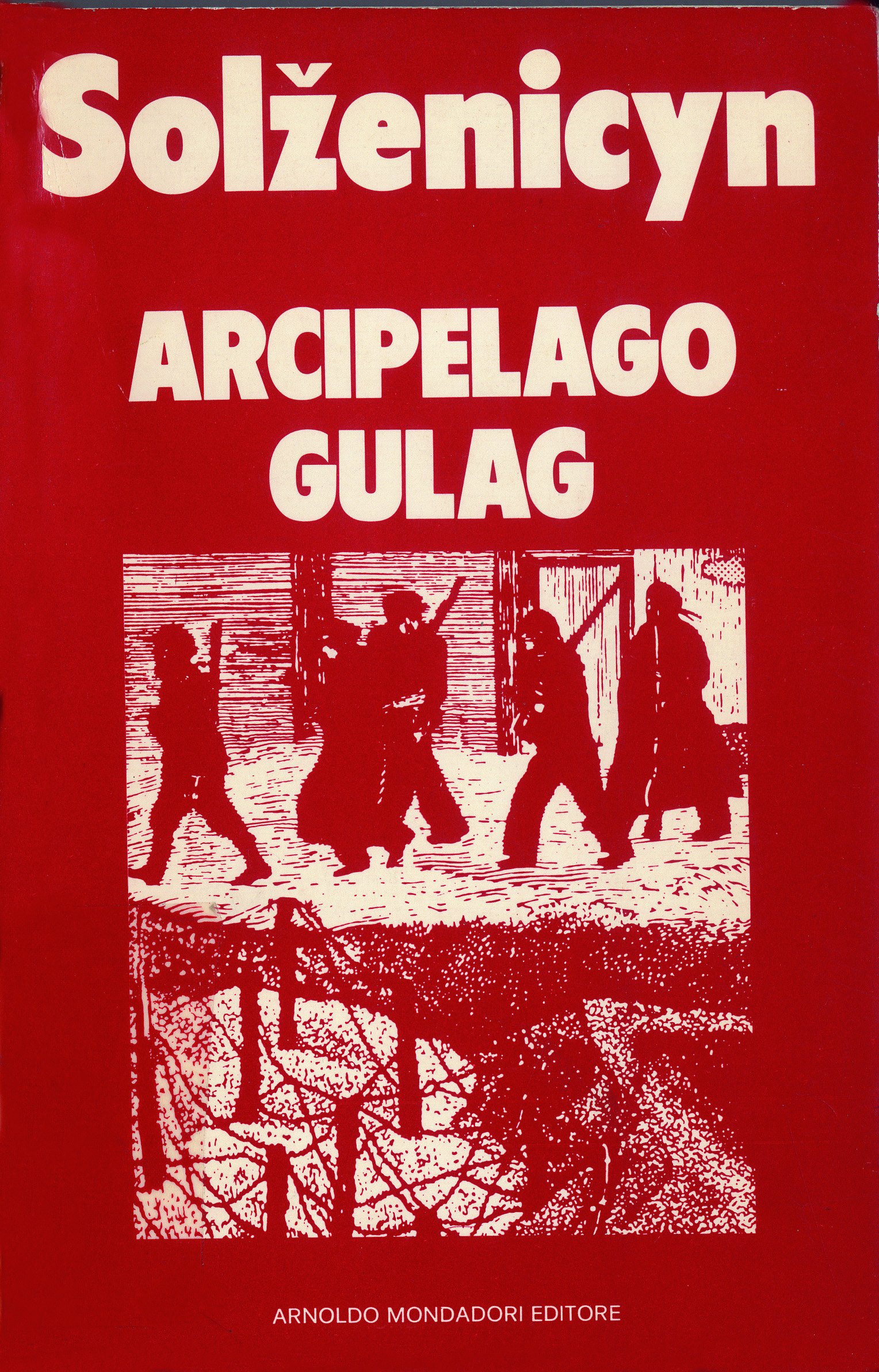 Copertina del libro Arcipelago Gulag di Sozenicyn. Incentrato sull'universo concentrazionario dell'Unione Sovietica, esce per Mondadori nella collana dei Saggi nel 1974, registrando un consistente successo di vendite.